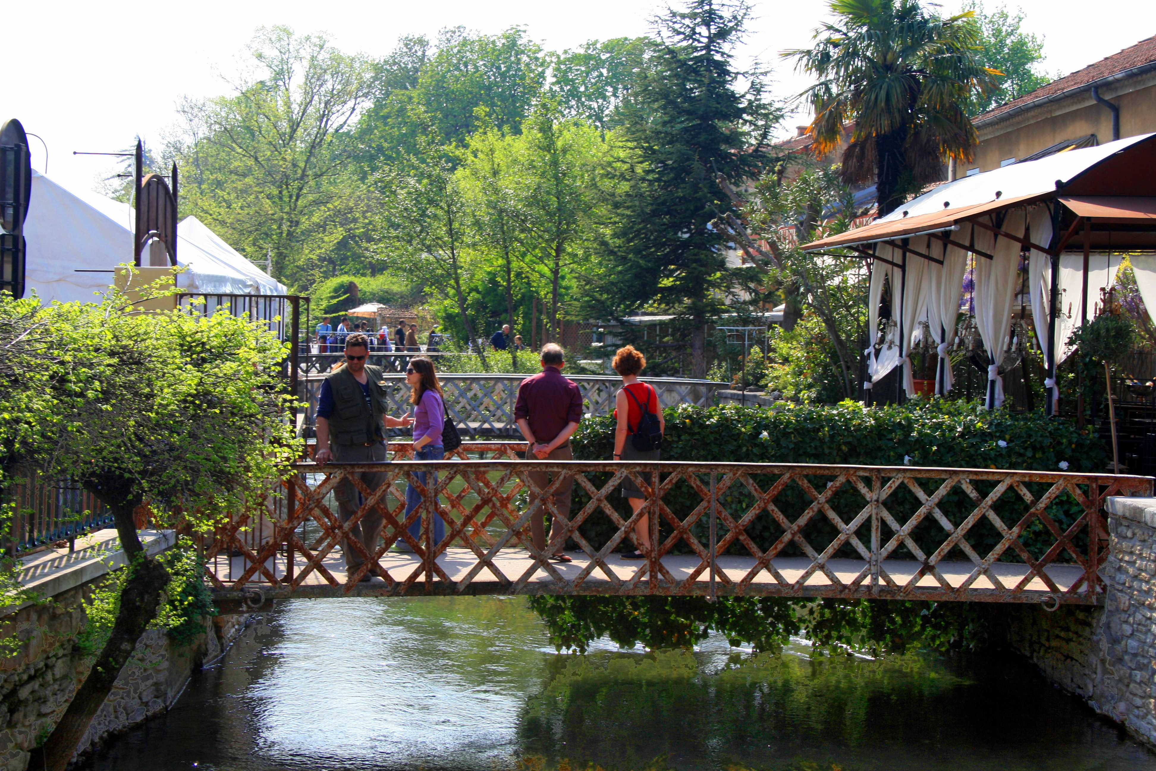 Passerelles sur la Sorgue à l'Isle-sur-la-Sorgue